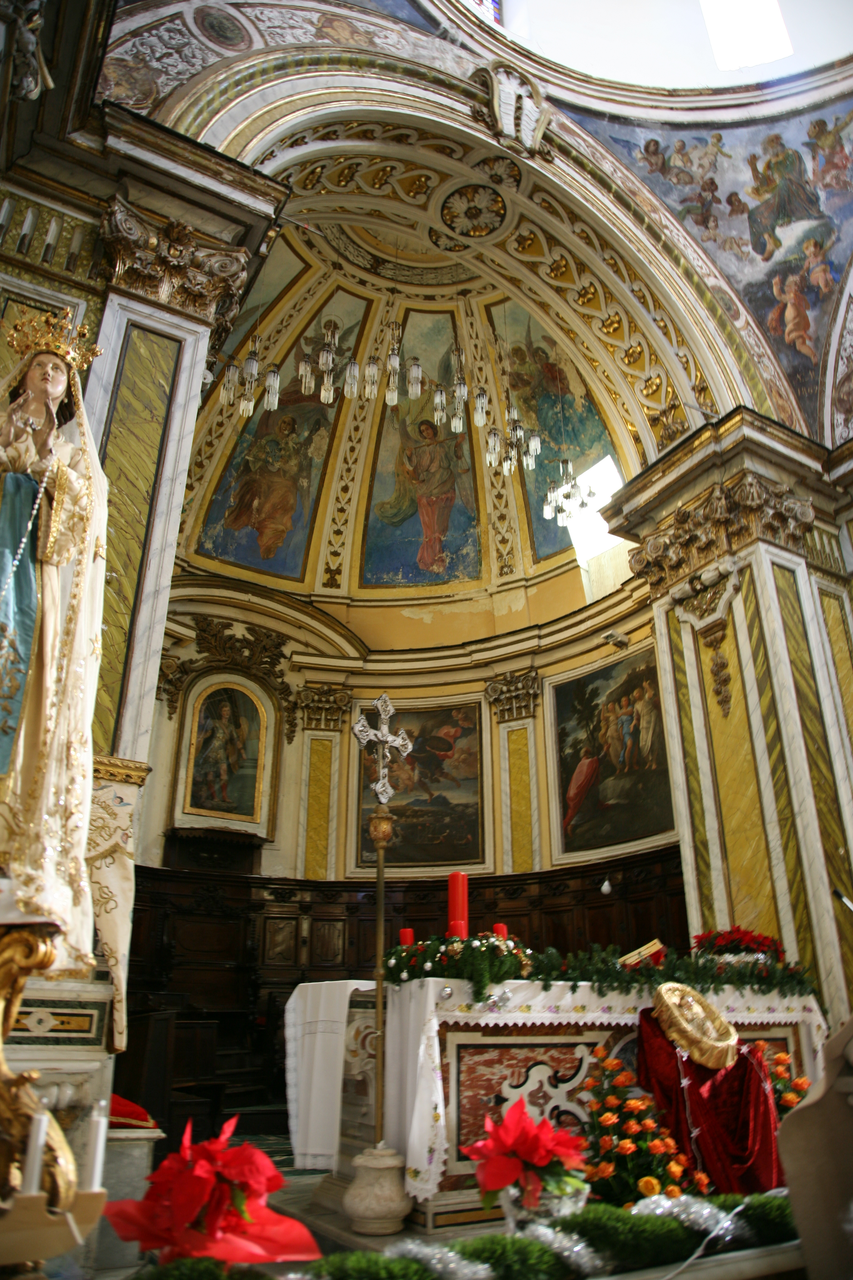 Procida, chiesa dell'Abbazia di San Michele Arcangelo: abside ed altare maggiore.